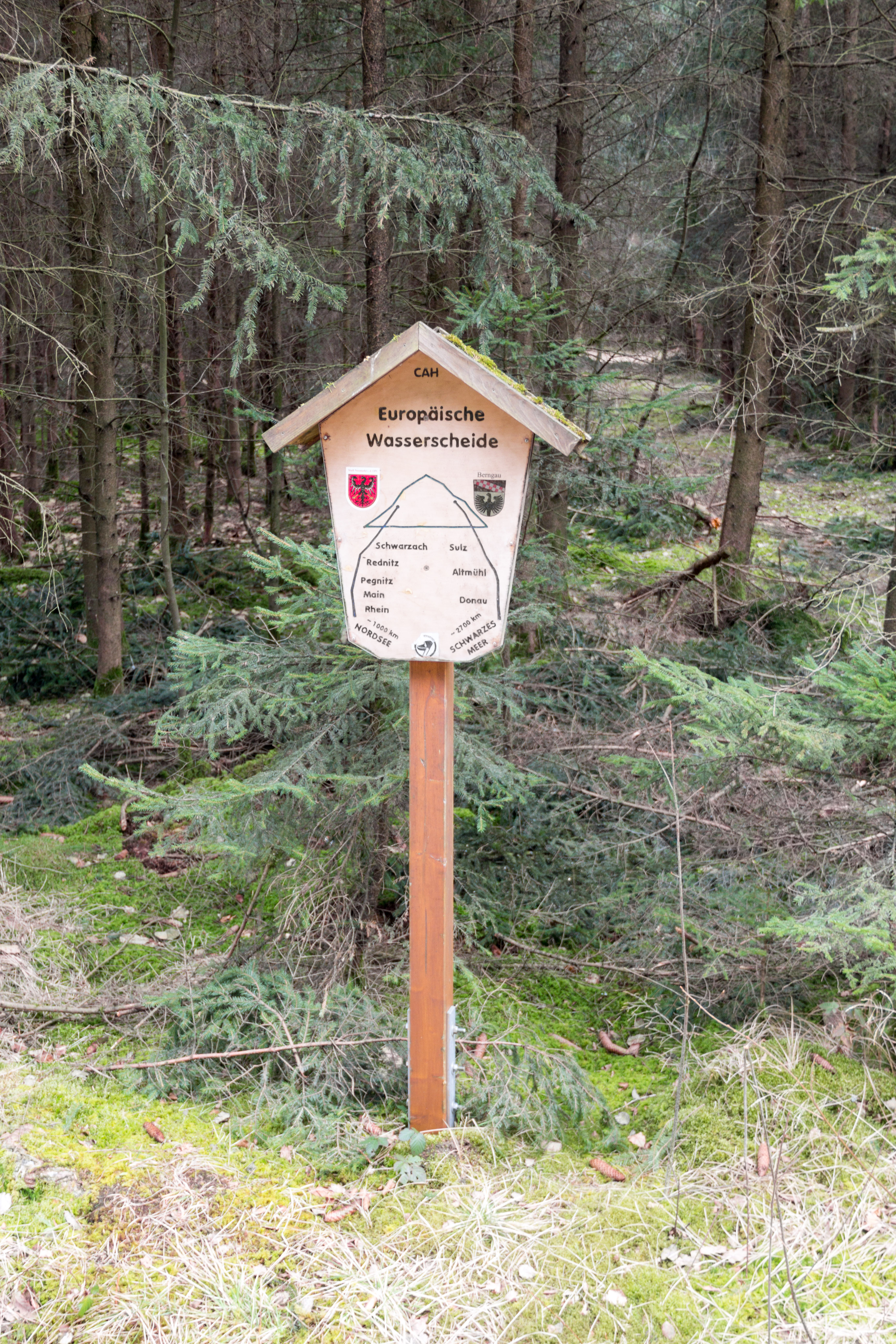 Wasserscheide Atlantik – Schwarzes Meer, Stauf, Berngau